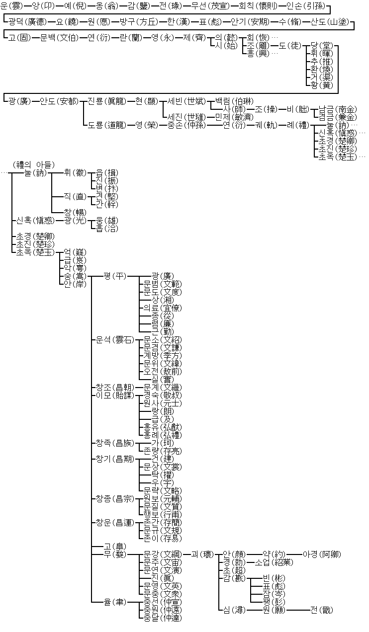 촉설(蜀薛) 계보